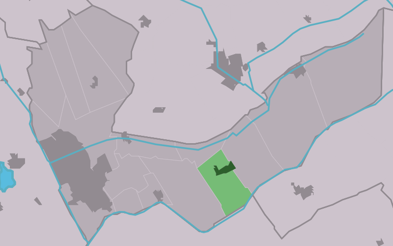 Kaartsje fan himrik fan Nijhoarne